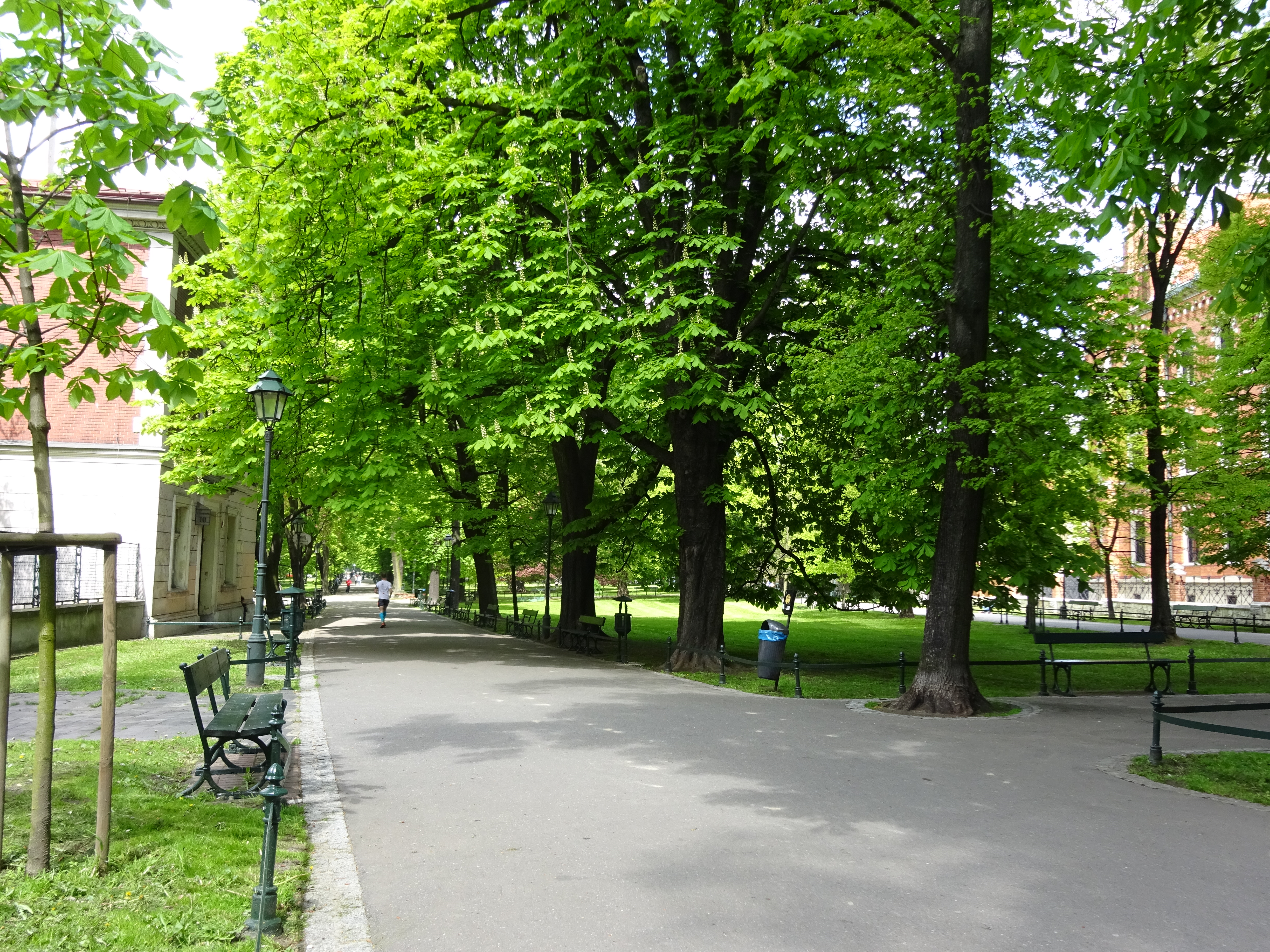 Planty Krakowskie, widok spod Wawelu w stronę ul. Franciszkańskiej. Wiosenna sceneria. 2016